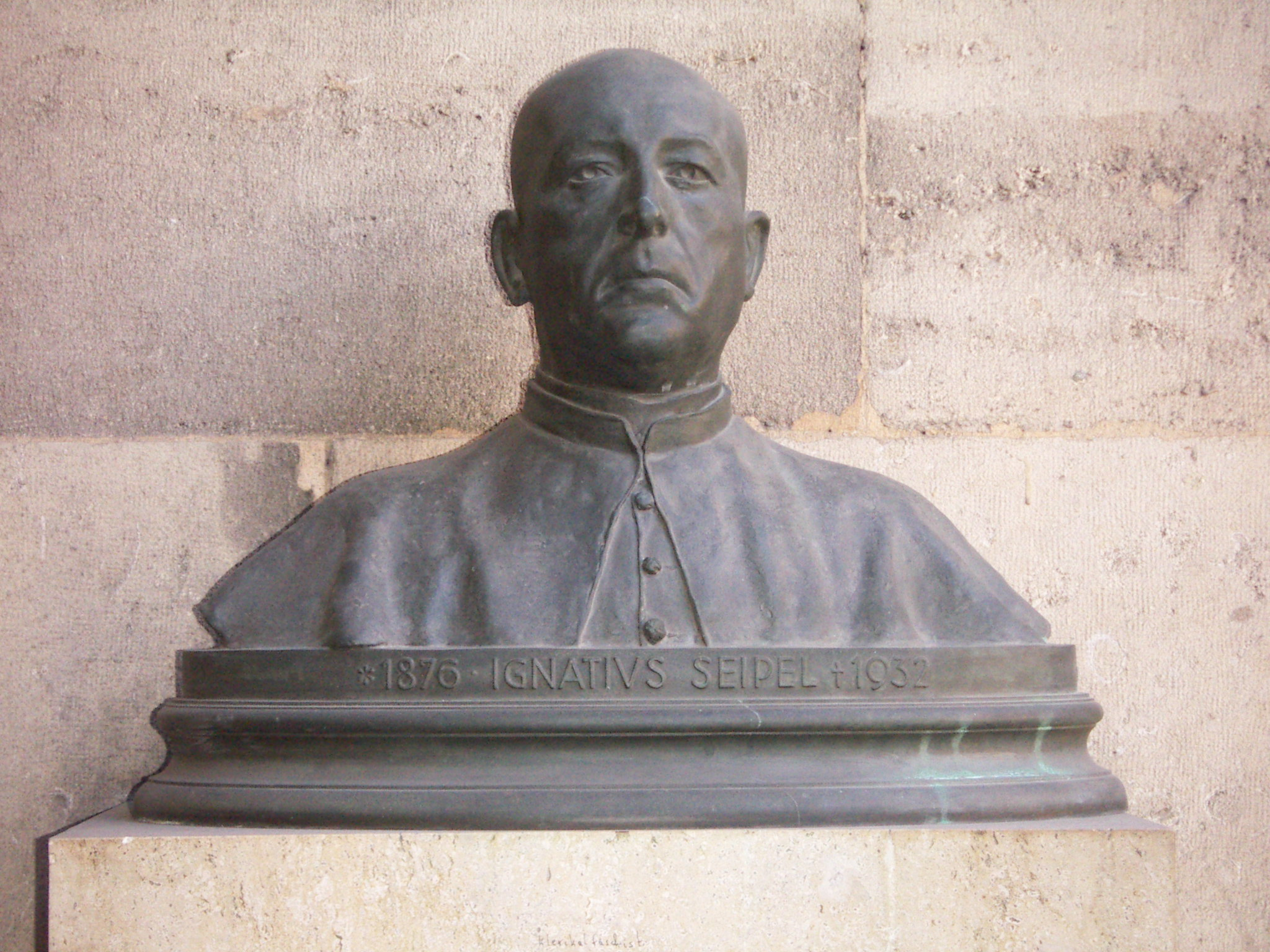 Ignaz Seipel, Denkmal, Arkadenhof, Universität Wien, von Josef Engelhart 1933 (1950)